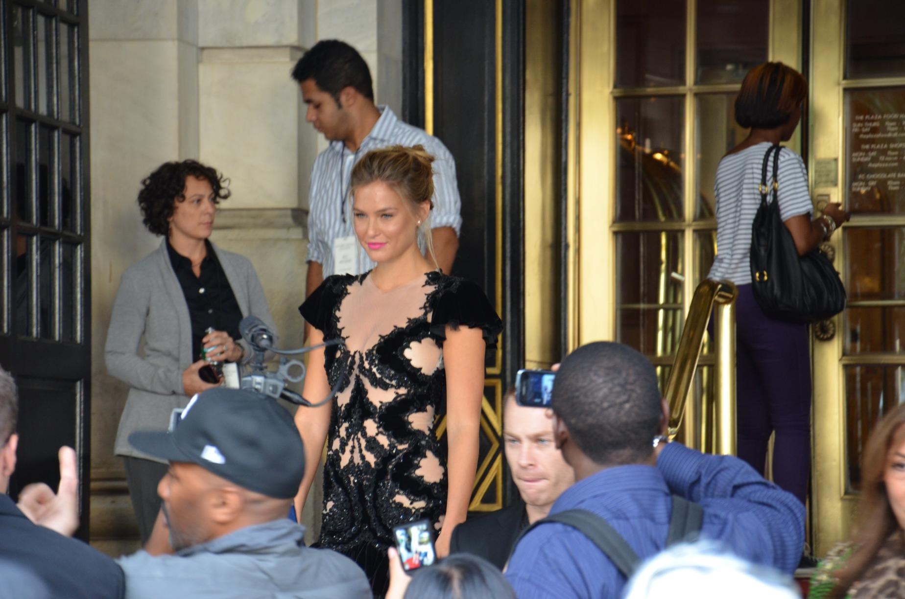 Bar Refaeli